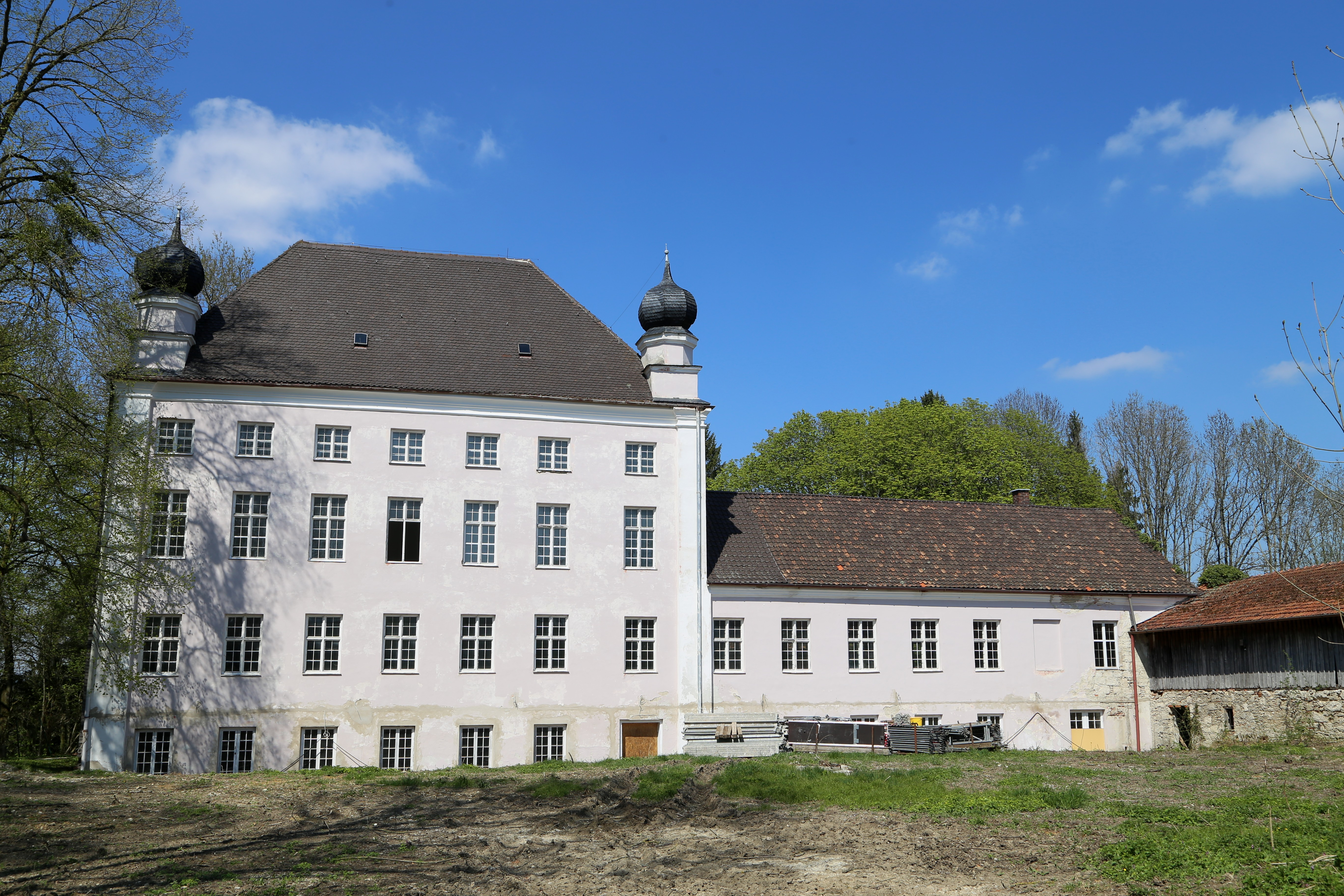 Schloßstraße 21, Großhöhenrain, Feldkirchen-Westerham, Schloss Höhenrain, Hauptbau drei- und viergeschossig, mit Steilwalmdach und Erkertürmen mit Zwiebeldächern, im Kern 1545, um 1725 und um 1760 barocke Ausbauten; mit Ausstattung; östlich angeschlossene Nebengebäude: Gasthaus, Torhalle, ehem. Brauereisaal, ehem. Remise, sämtlich 2. Hälfte 19. bis Anfang 20. Jahrhundert